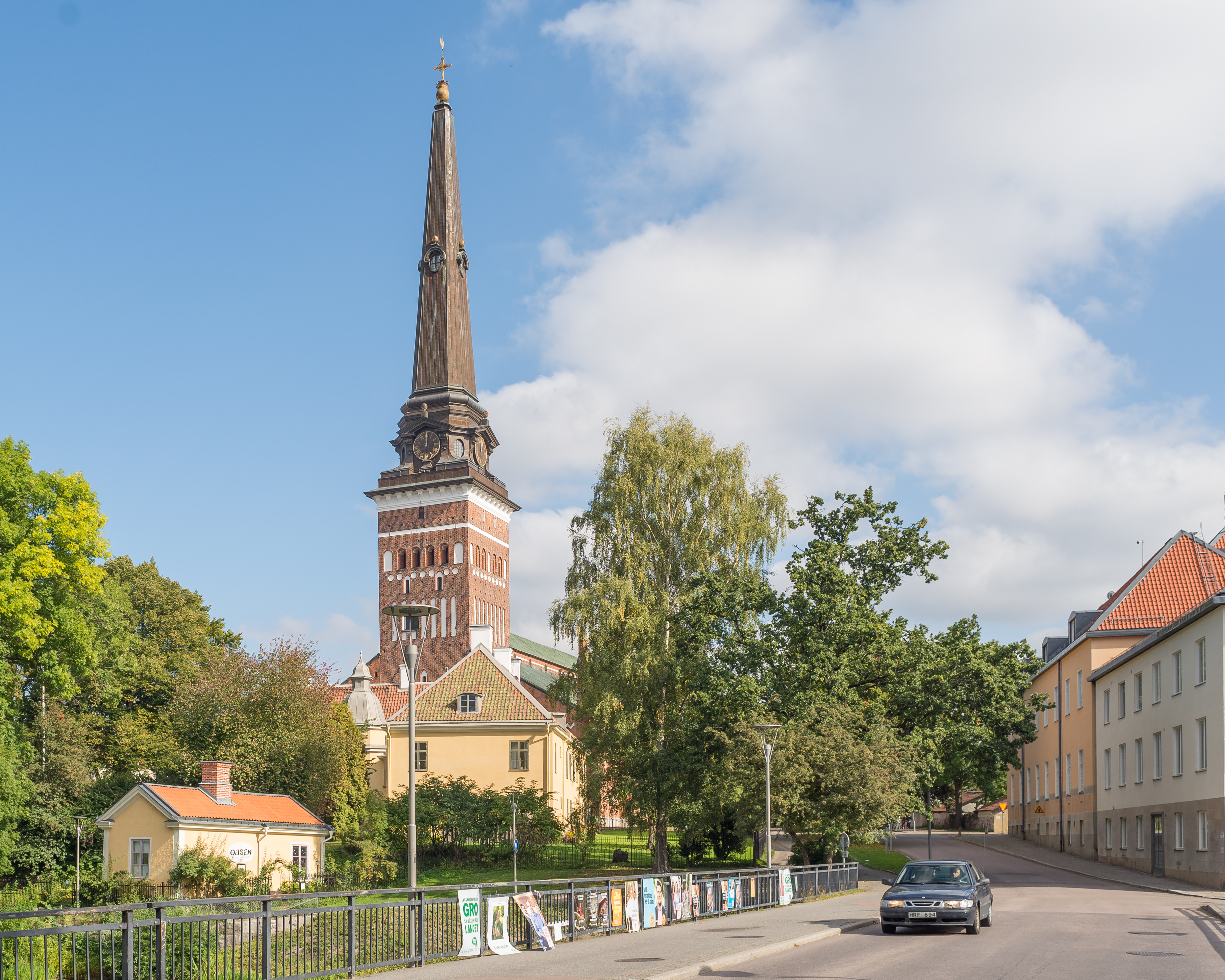 Västerås domkyrka.